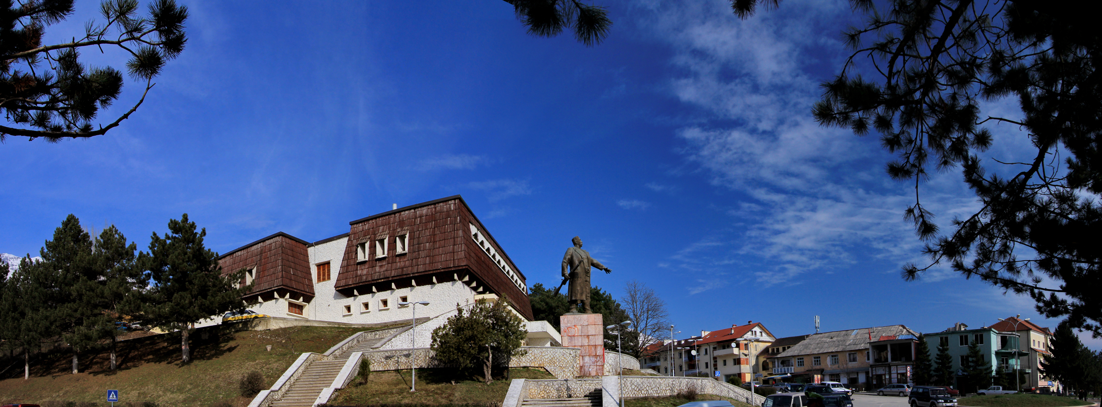 Bajram Curri Panoramë